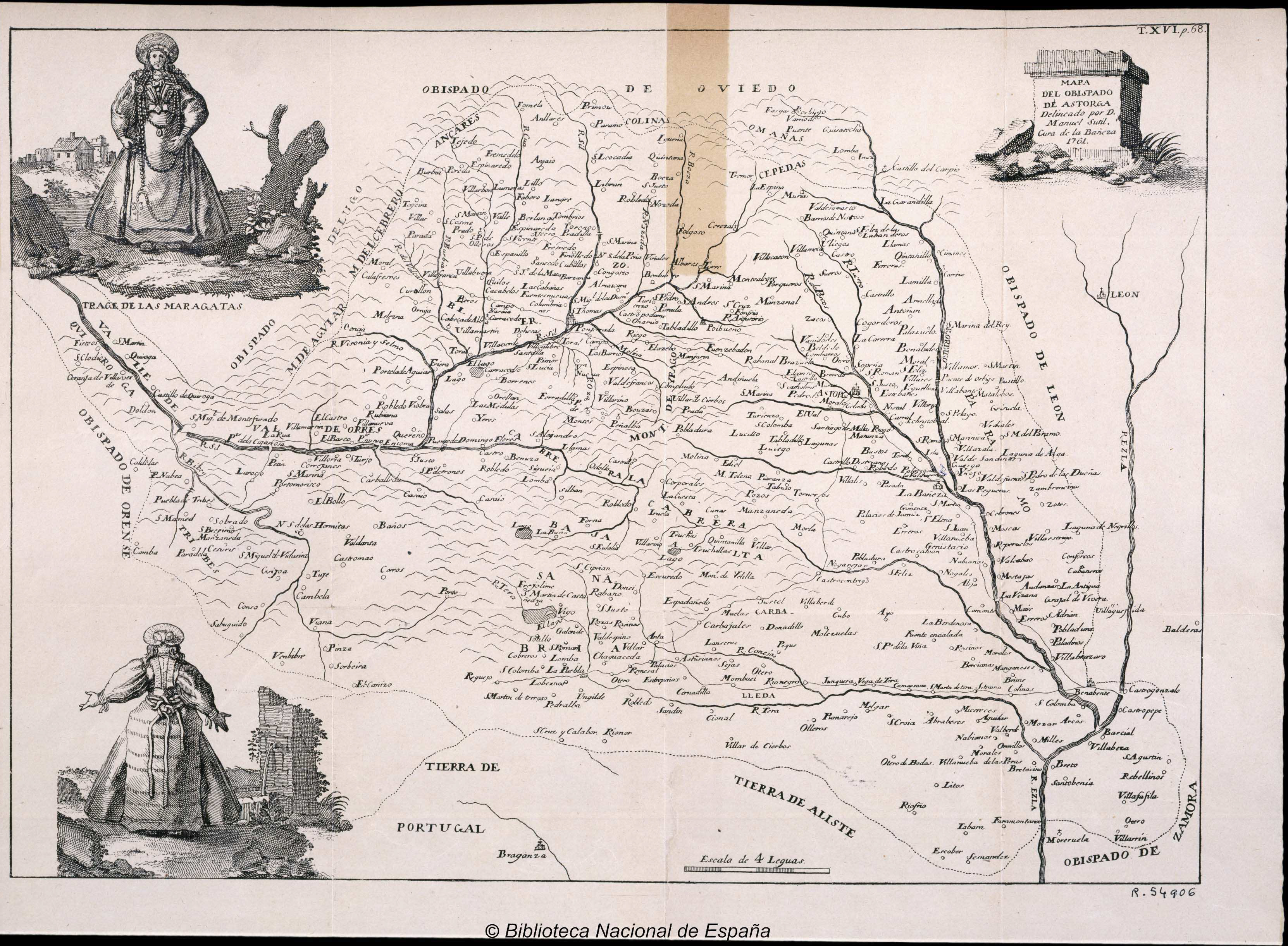 Mapa do bispado de Astorga.